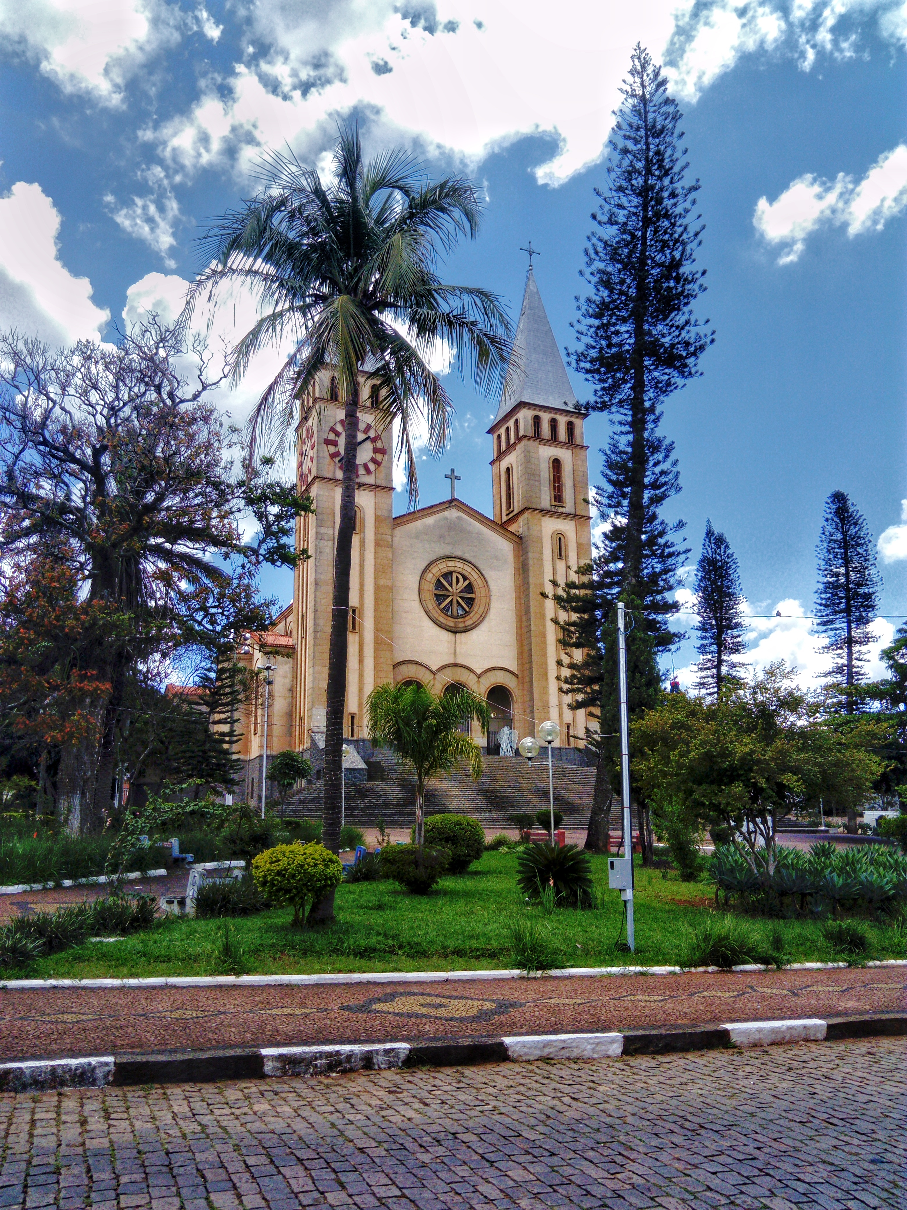 Igreja sede da diocese de Guaxupé.